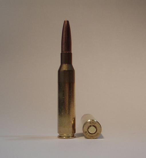 6.5 x 52mm Carcano